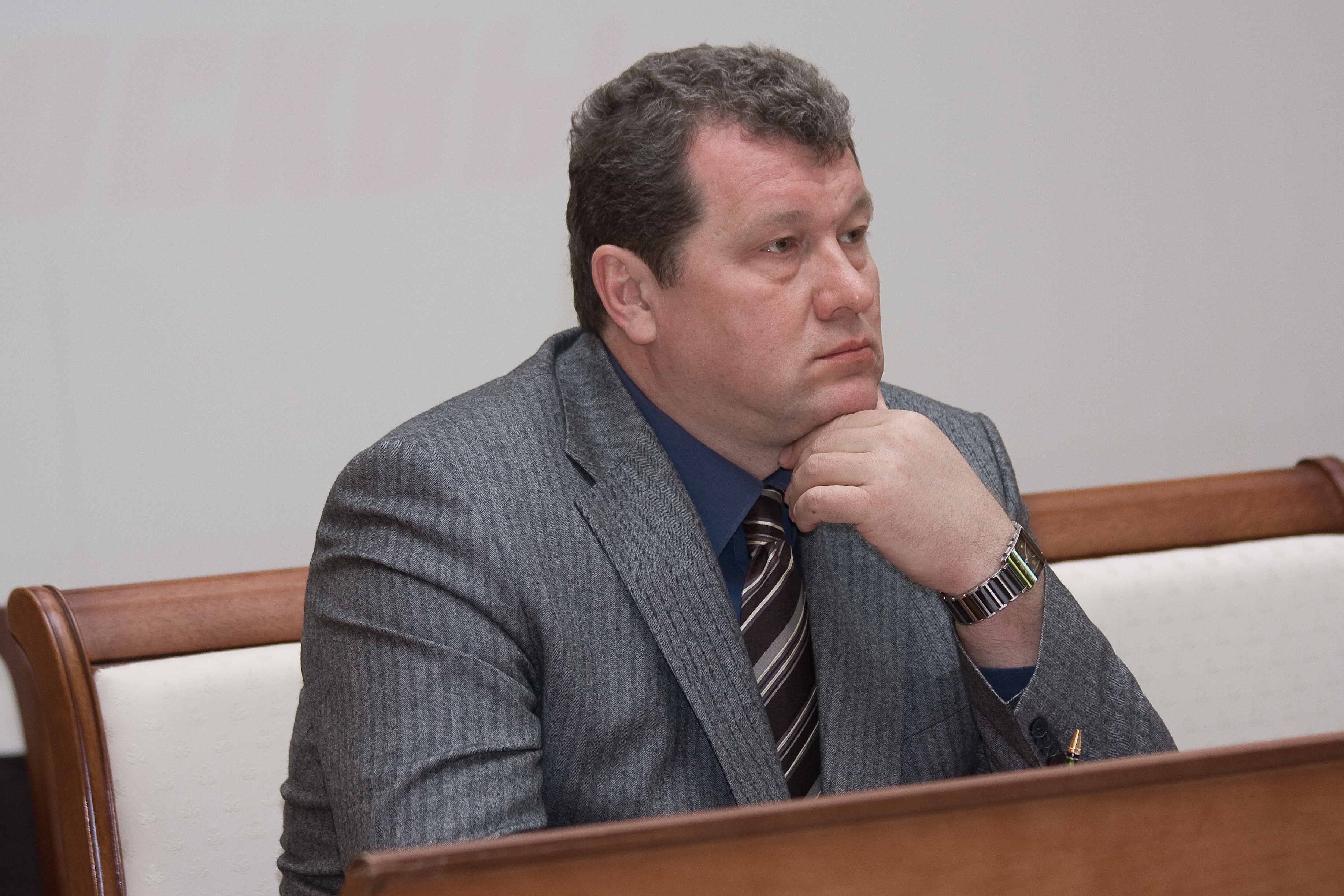 Белов Владимир Борисович